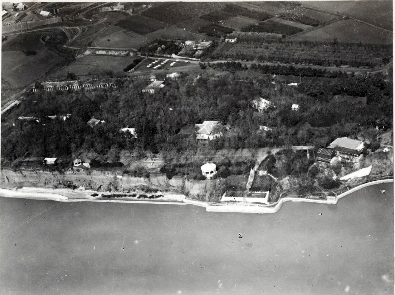 Таганрог. Елизаветинский парк. 1918 год, место квартирования 27 авиаэскадрона германской армии.